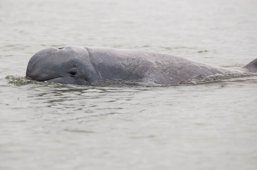 Cambodia,Irawadi Delphin,Irawadidelfin,Irrawaddy Delfin,Mekong,Orcaella brevirostris, Kambodscha, Irrawaddy dolphin